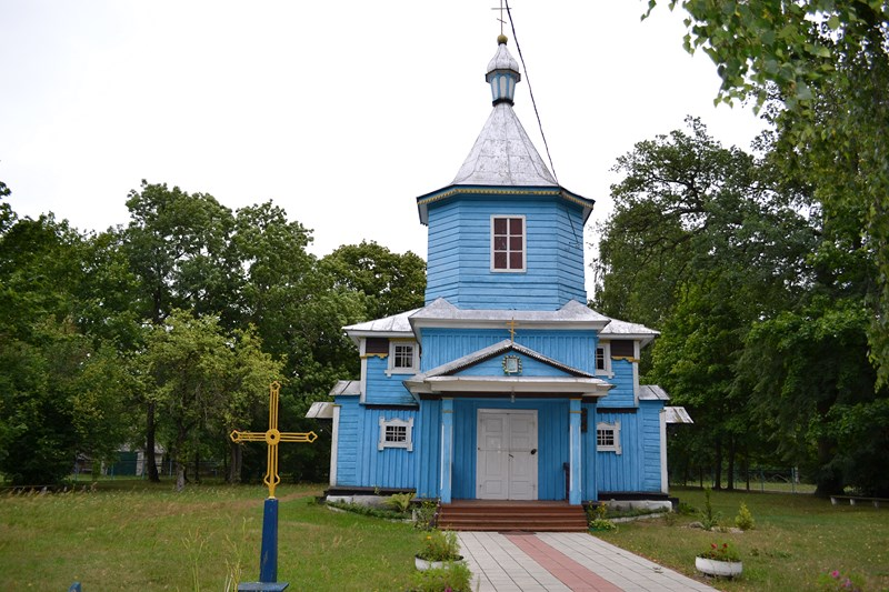 Навасёлкі (Навасёлкаўскі сельсавет, Кобрынскі раён). Міхайлаўская царква